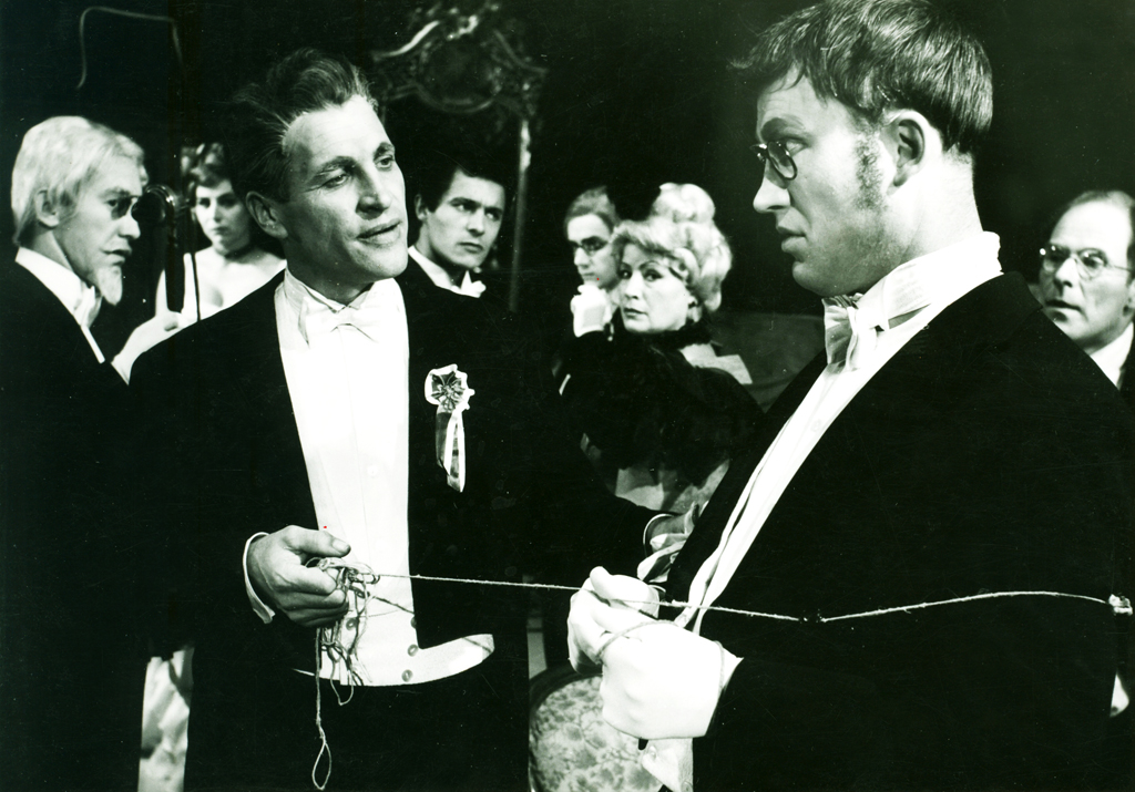 Ivan Cankar, Za narodov blagor, Slovensko ljudsko gledališče Celje. Na fotografiji: Brane Grubar (Jožef Mermolja), Mija Mencej (Helena), Joże Pristov (dr. Pavel Gruden), Franci Gabrovšek (Siratka), Andrej Nahtigal (Stebelce), Marija Goršič (Mrmoljevka), Aleksander Krošl (Aleksej pl. Gornik), Marjan Dolinar (Profesor Kremžar).